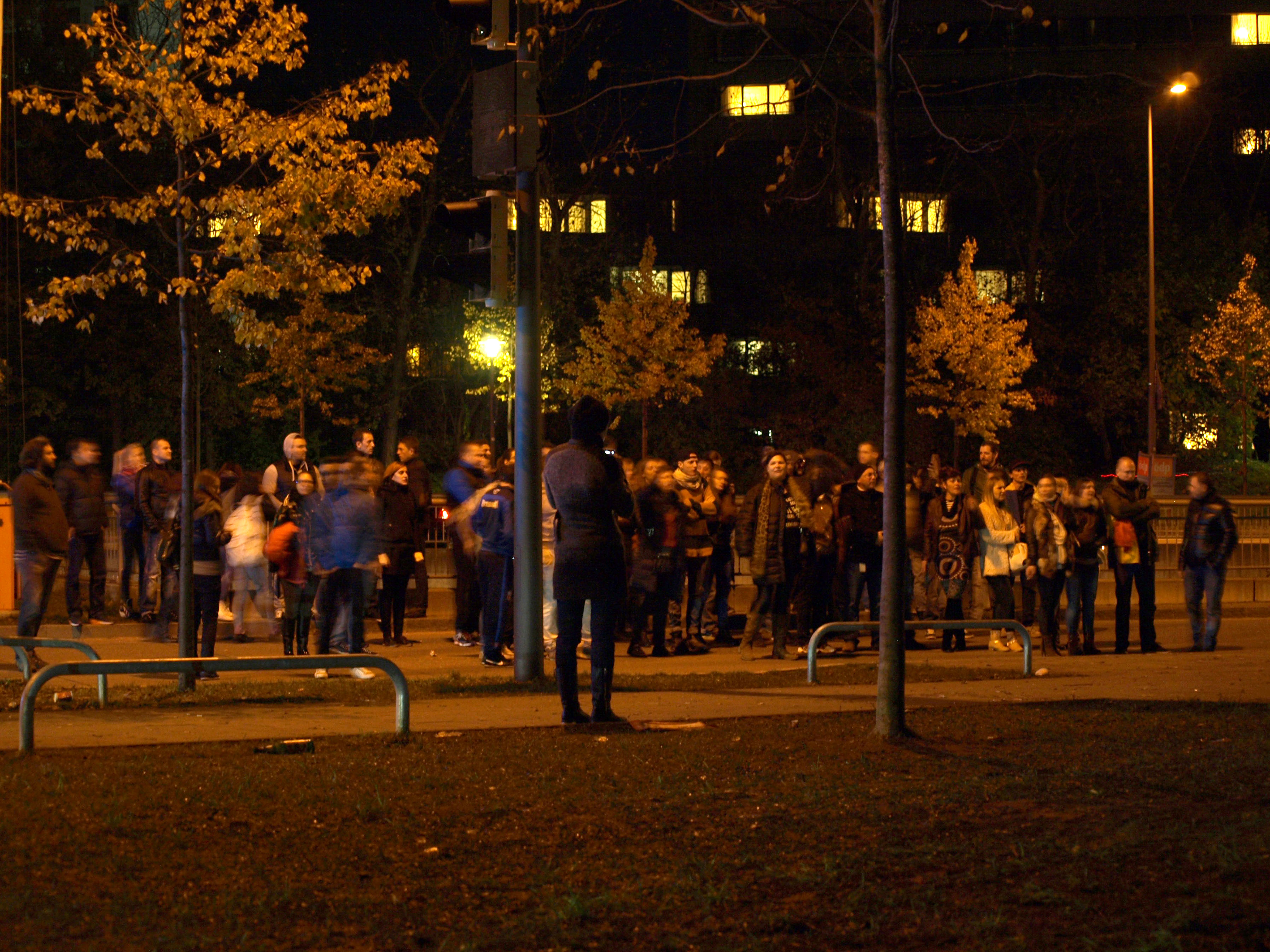 Vot și proteste la München 2 noiembrie 2014 Dan Mihai Pitea